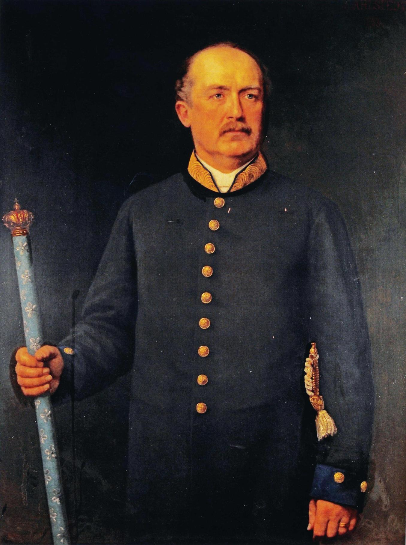 Maamarsalkka ja myöhempi senaattori Samuel Werner von Troil, aatelissäädyn tilaama muotokuva. Omistaja Ritarihuone.